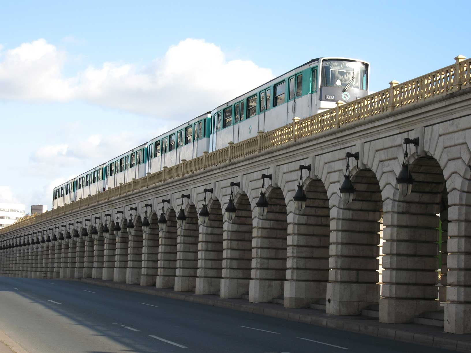 Métro de Paris, Viaduc de Bercy (ligne 6), Paris, France